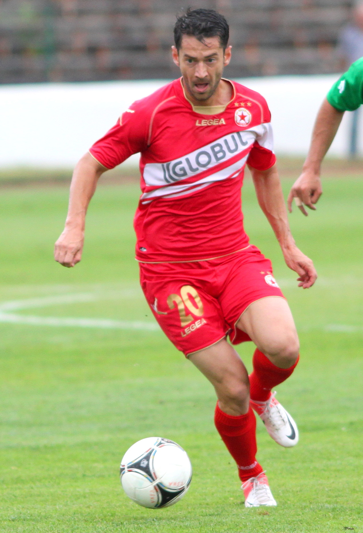 Александру Пакурар (на румънски език - Alexandru Păcurar) е румънски професионален футболист, атакуващ полузащитник, състезател на ПФК ЦСКА (София)